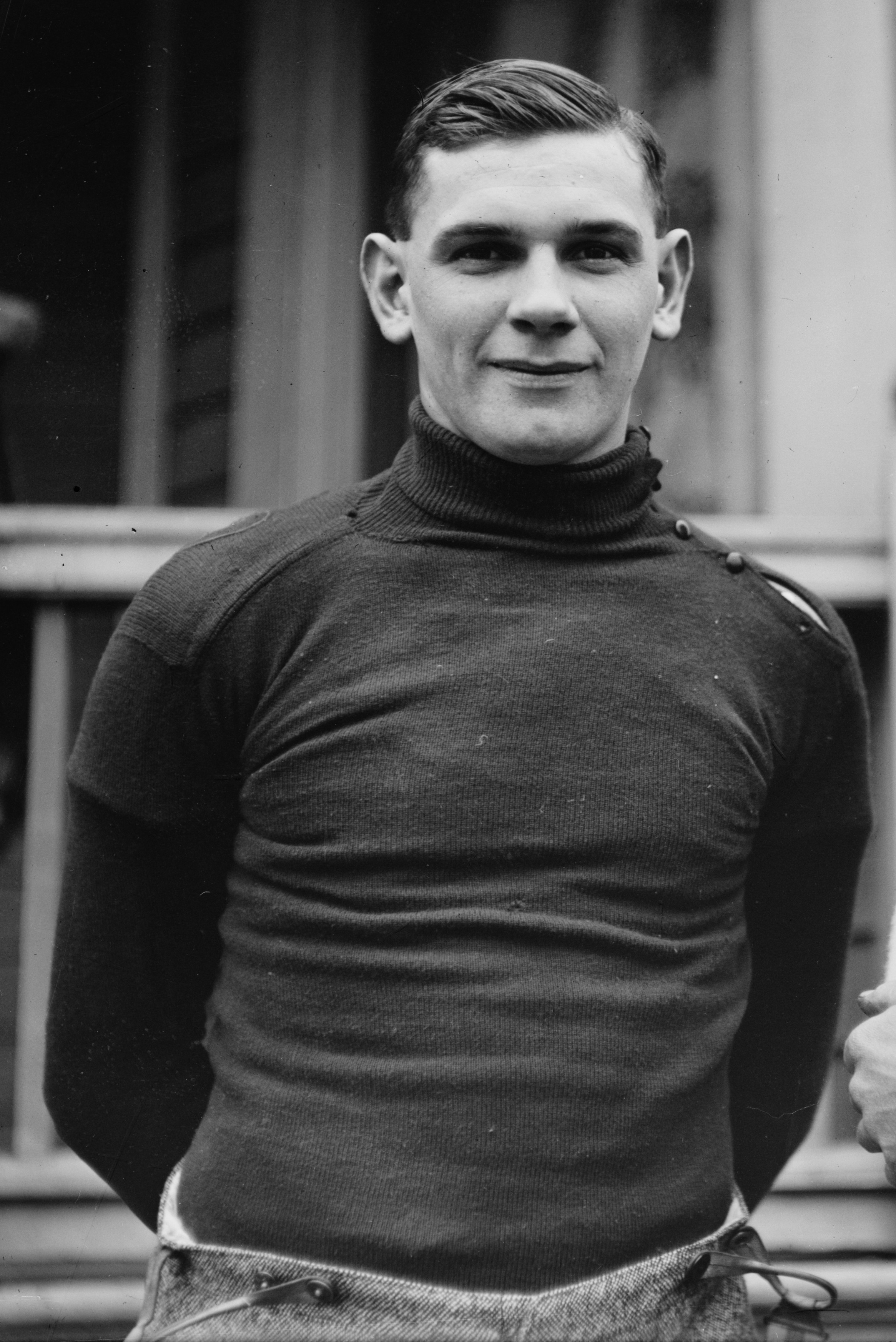 Paul Suter 12/6/12